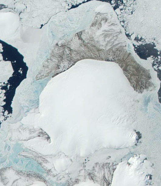 Wyspa Komsomolec